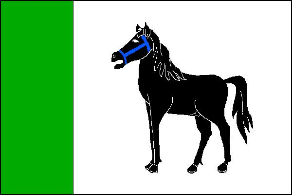 Vlajka obce Slezské Rudoltice